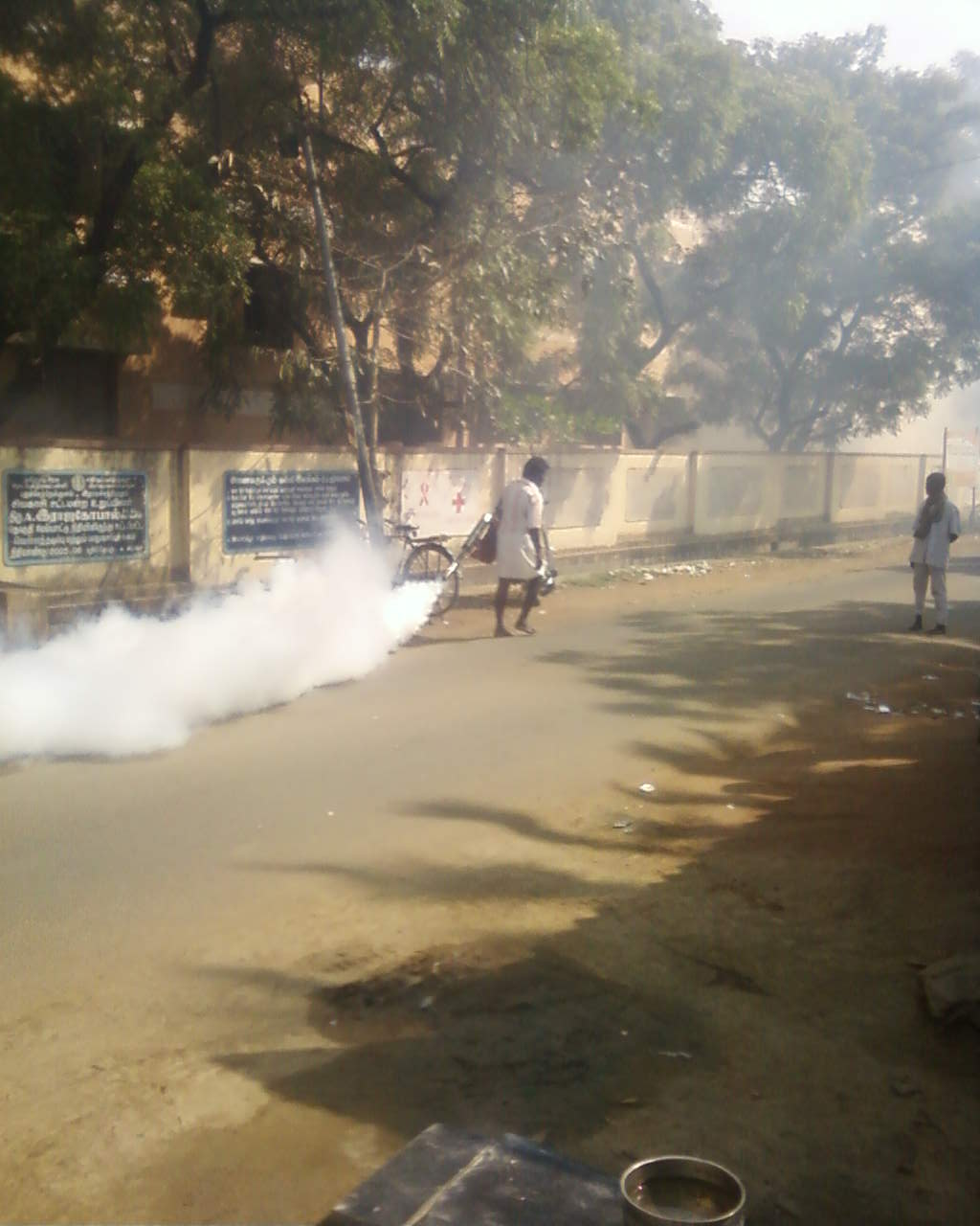 கொசு ஒழிப்பு (Mosquito control) இரசாயன பூச்சிகொல்லி புகை இயந்திரம்.